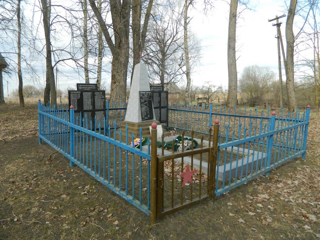 Братская могила советских воинов и партизан, погибших в боях с немецко-фашистскими захватчиками: Большая Жукова, Дятьковский район, Брянская область